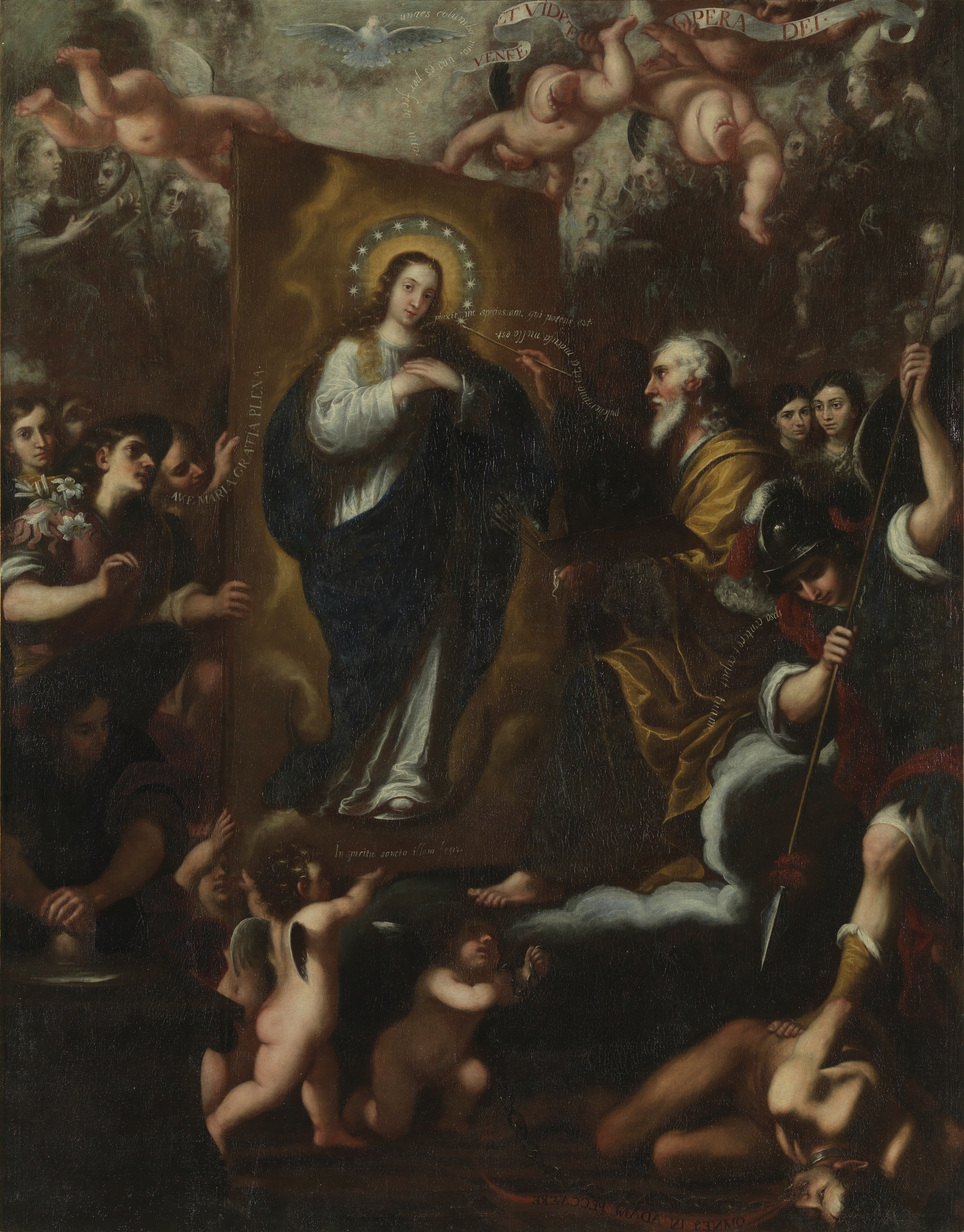 La obra representa a Dios Padre retratando a la Inmaculada Concepción.